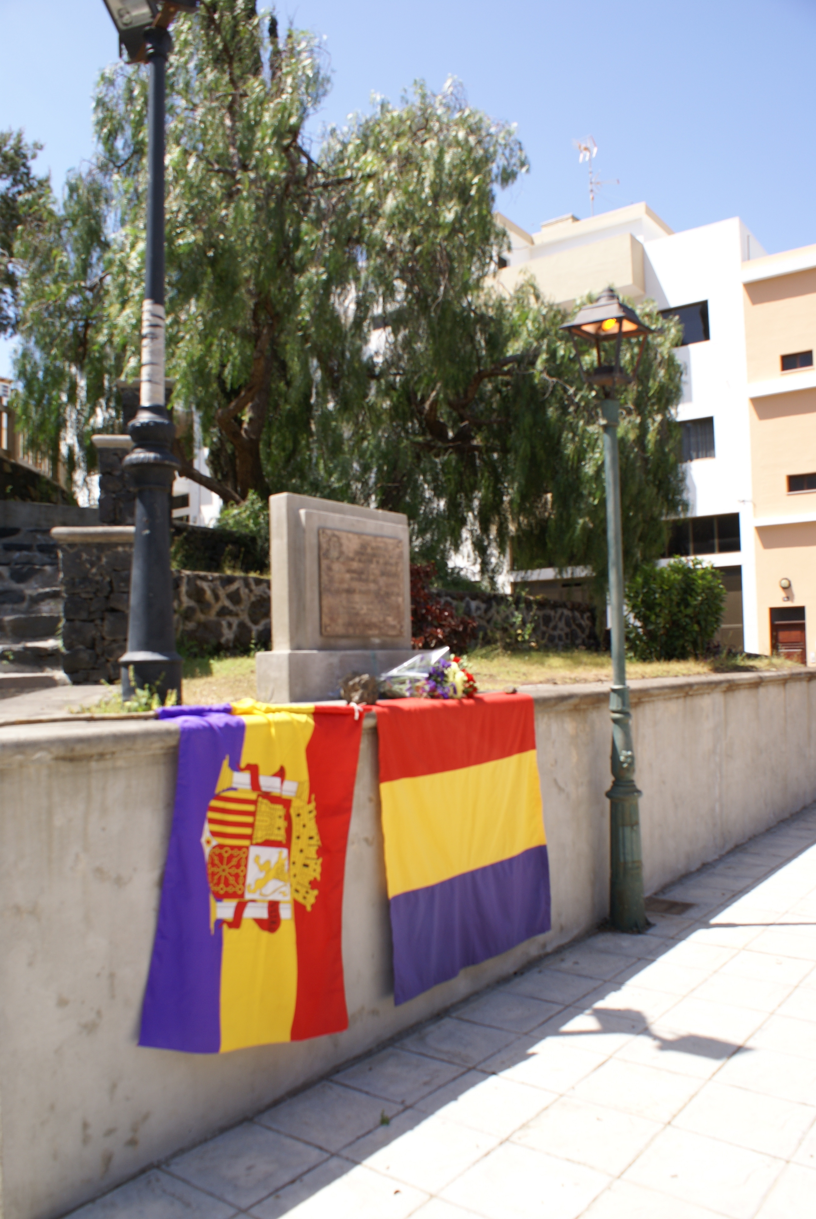 Banderas de la II República junto a la placa dedicada a la memoria del alcalde Francisco Rodríguez Betancourt, asesinado tras el golpe de estado del general Franco, en Los Llanos de Aridane.